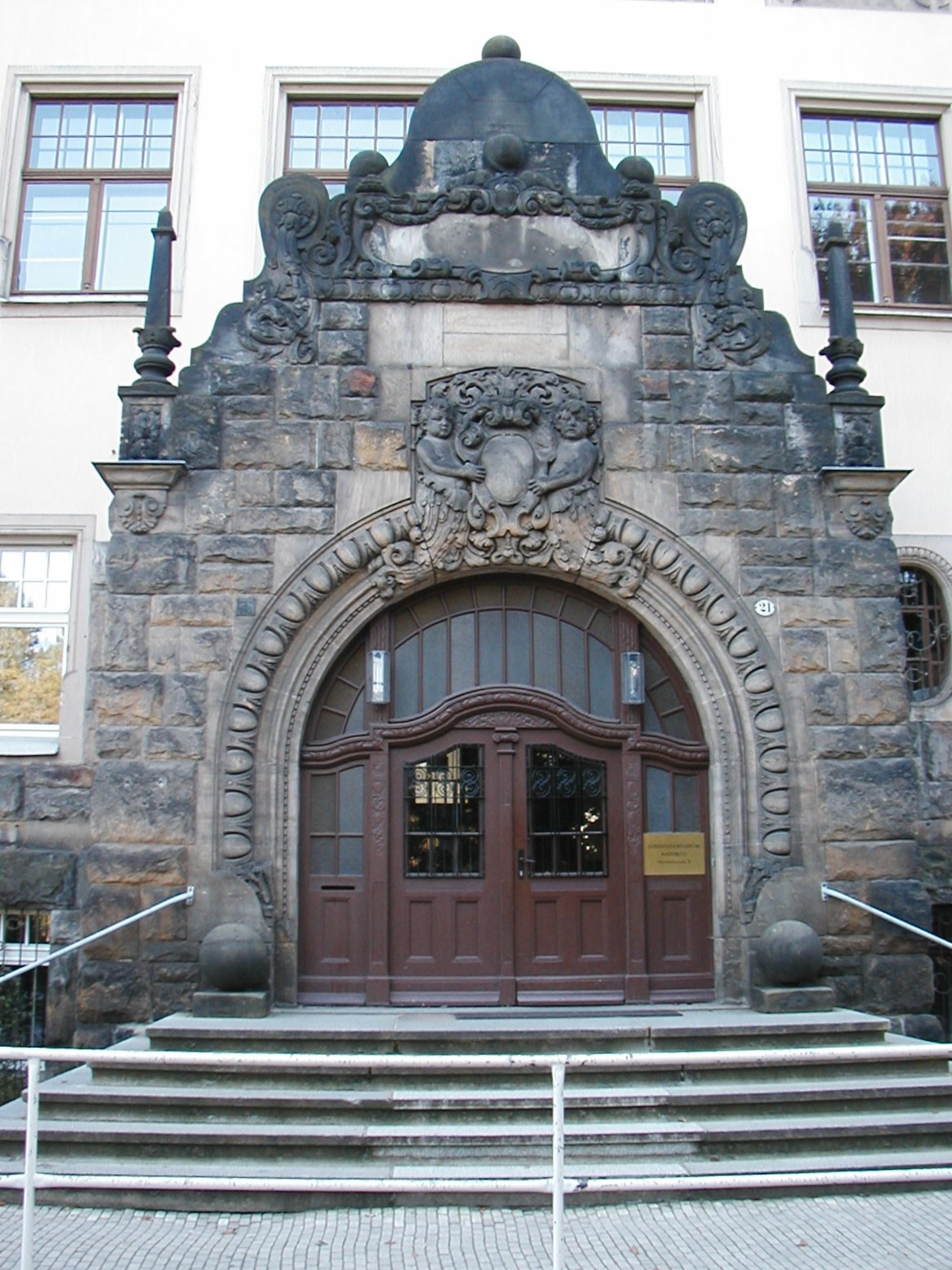 Steinbachhaus Radebeul